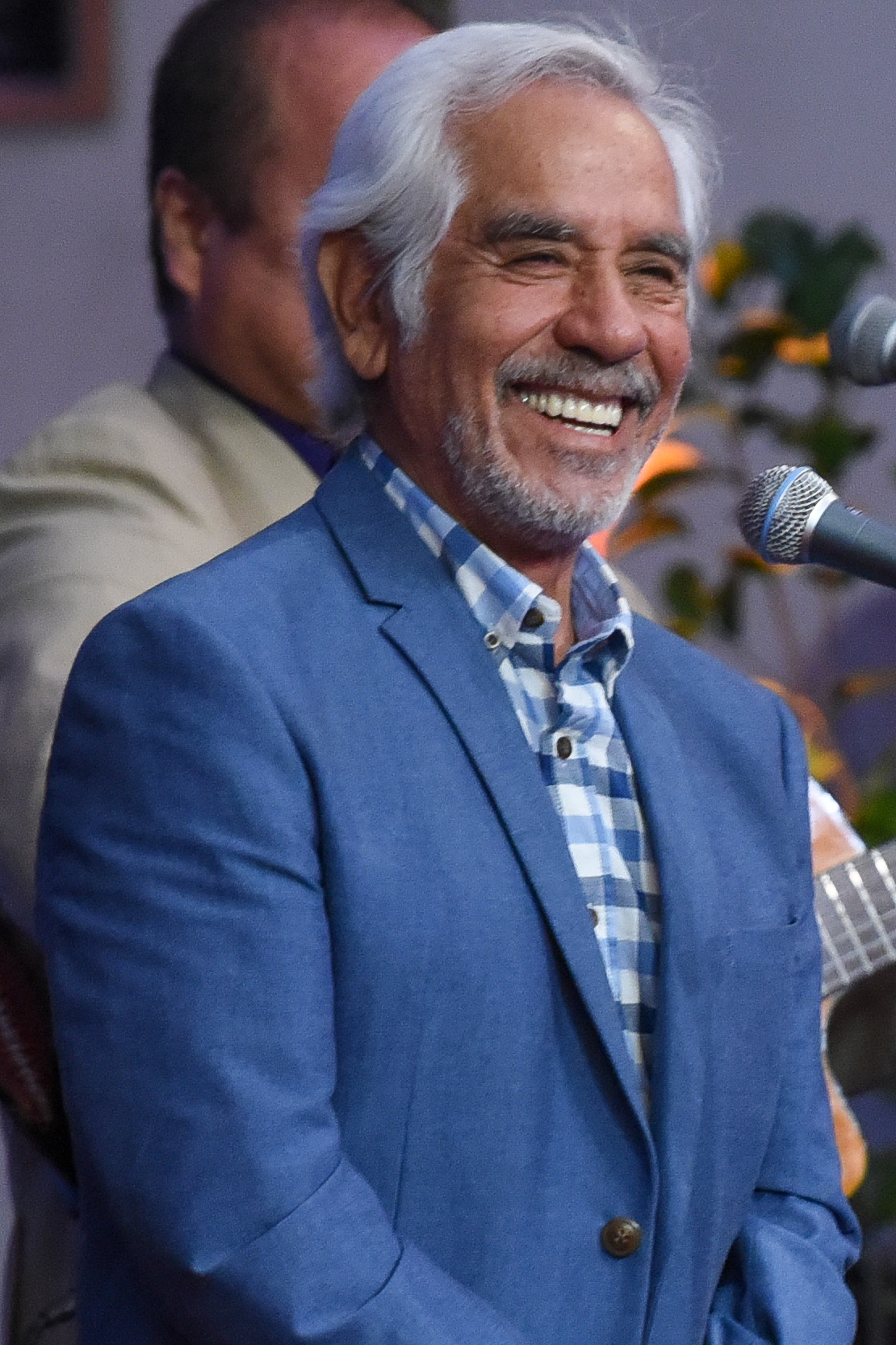 Ministra Narváez asiste a Premio a la Música Nacional 2017